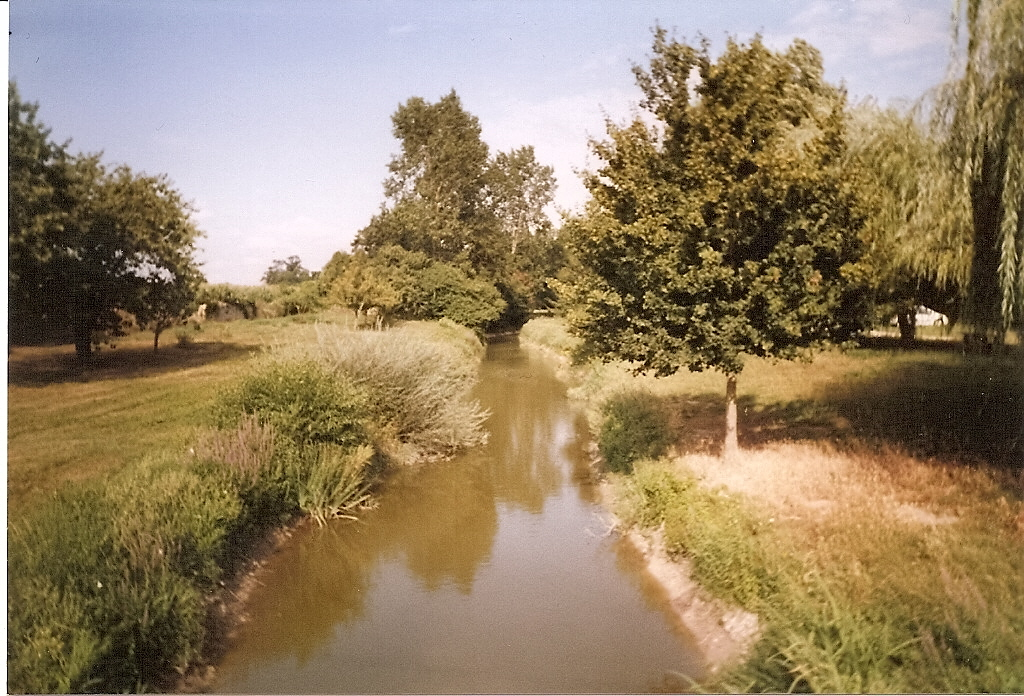 la rivière Trézence près du Moulin de Migré (17)